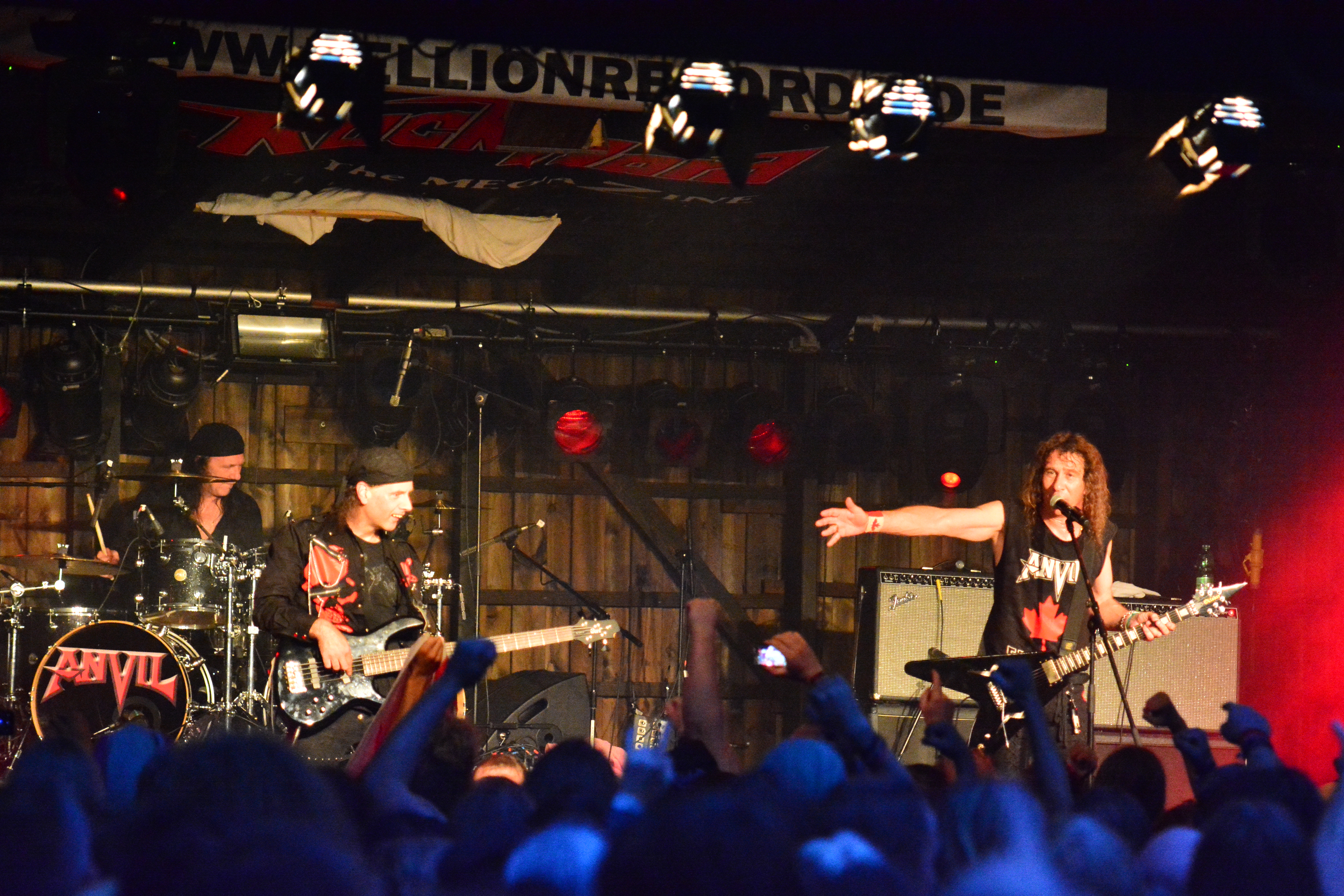 Anvil beim Headbangers Open Air 2014